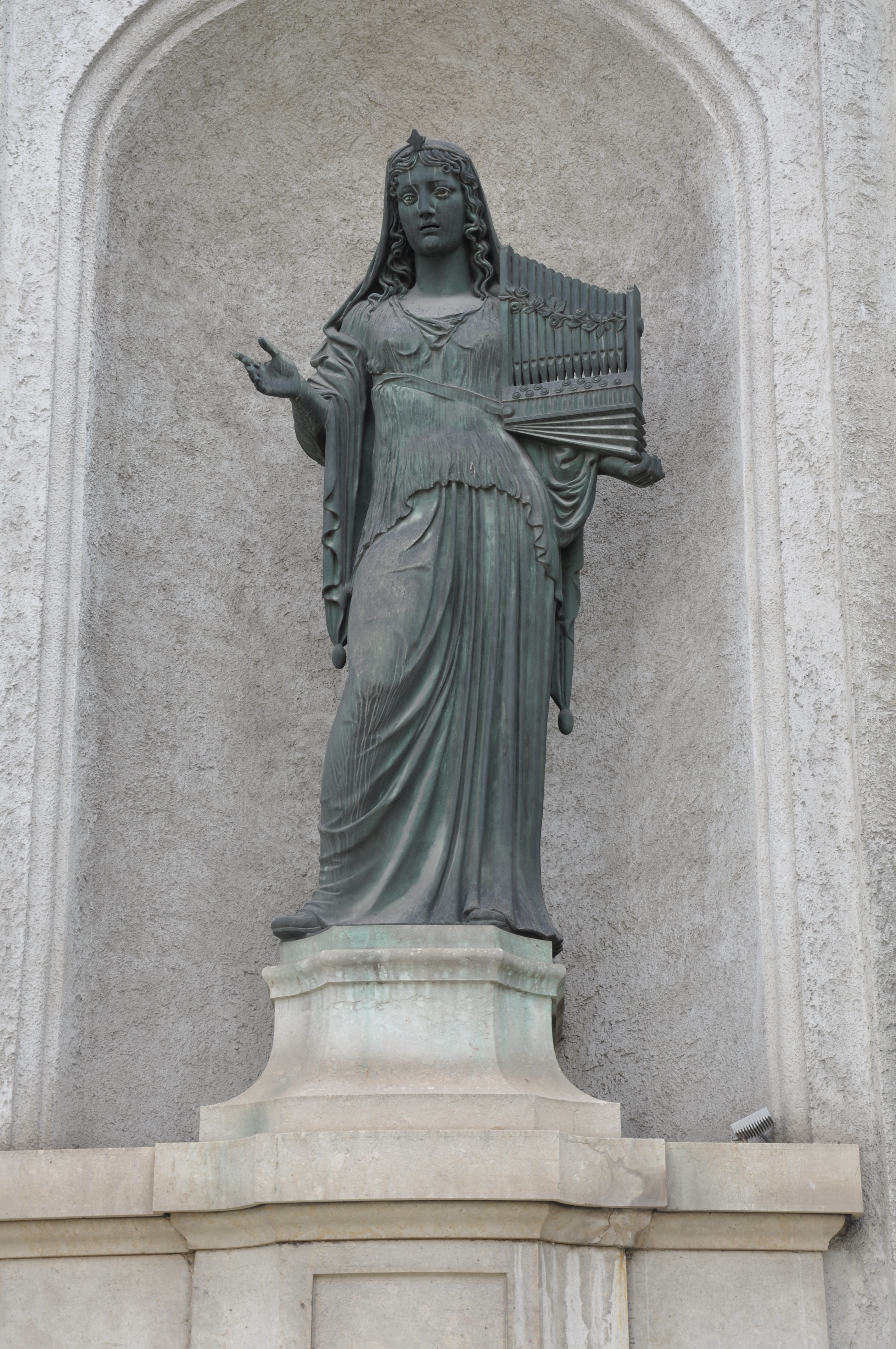 Salzburg, Mozarteum, Großer Saal, Außenansicht zur Schwarzstraße, Skulptur mit Orgel